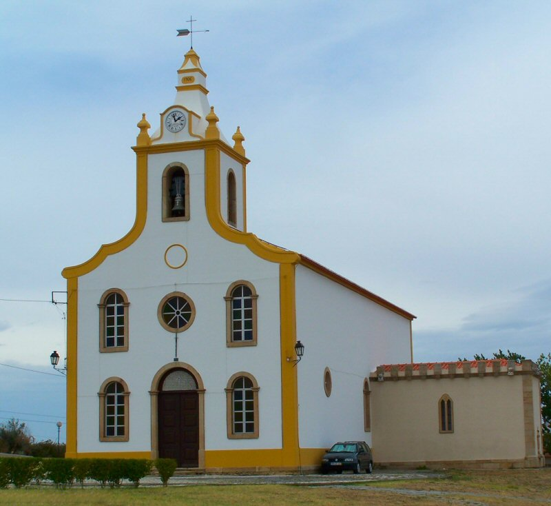 Flor da Rosa é uma freguesia portuguesa do concelho do Crato, com 10.4 km² de área e 328 habitantes (2001). Densidade: 33,2 hab/km².